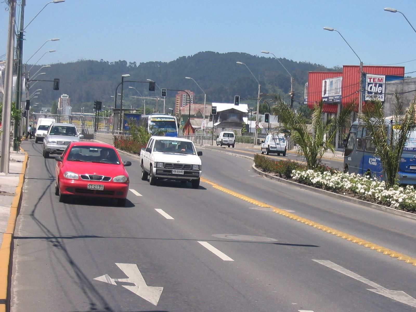 avenida Paicaví